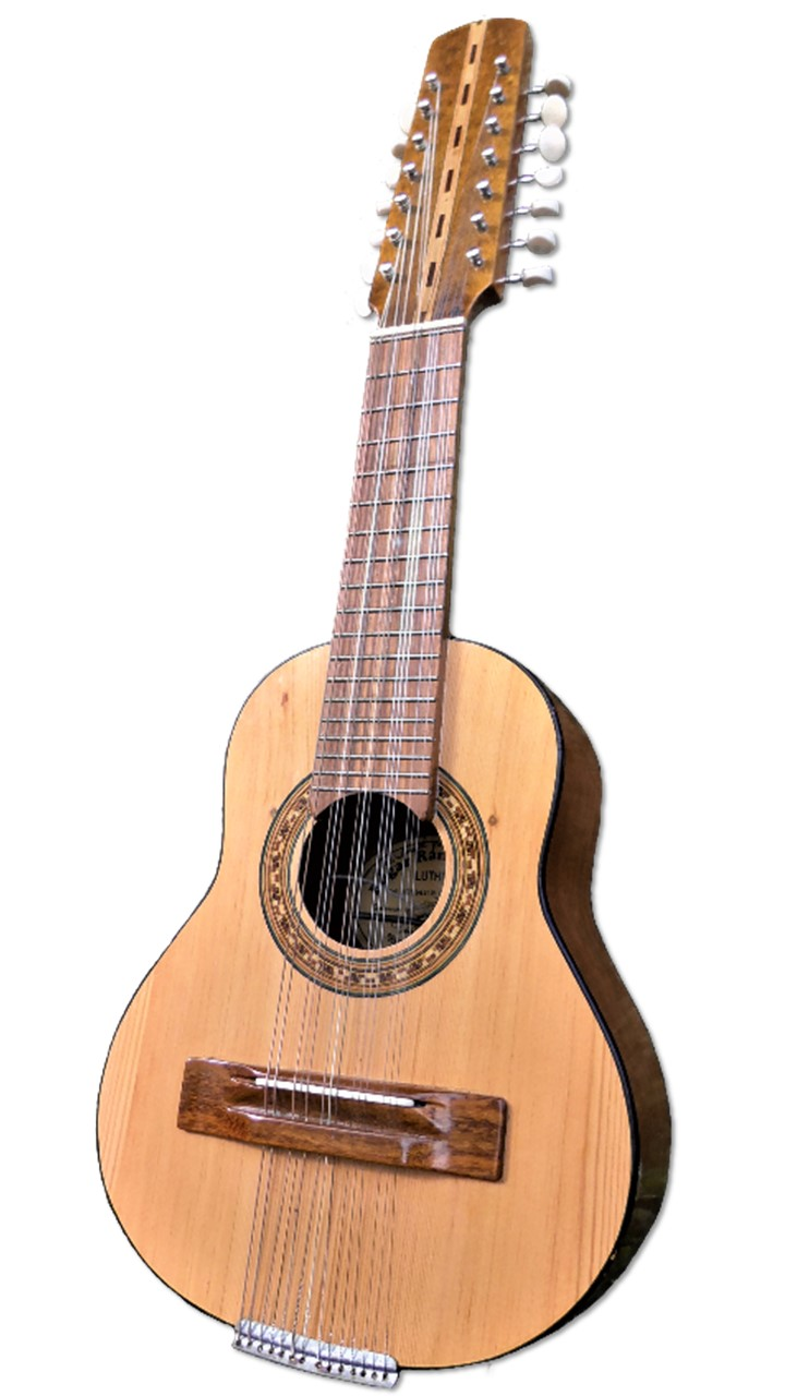 Bandolín fabricado a pedido por Edgar Ramirez en el pueblo de Seburuco del estado Táchira para Miguel Angel Chacón Acevedo, director de la agrupación Los Montañeros, editor de esta pagina y promotor del impulso de la música Tachirense de Raíz.